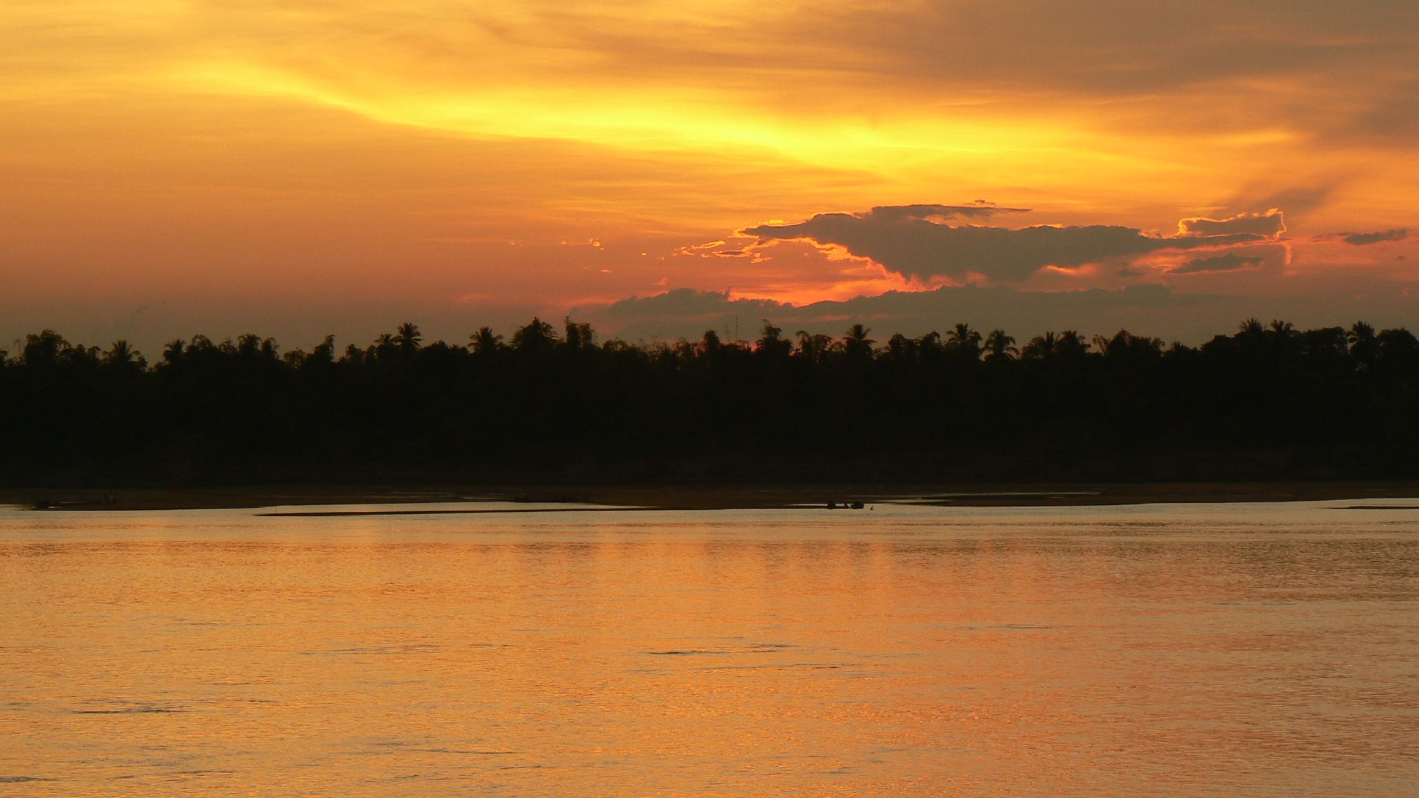 Sunset over Boeng Kak lake, Phnom Penh, Cambodia